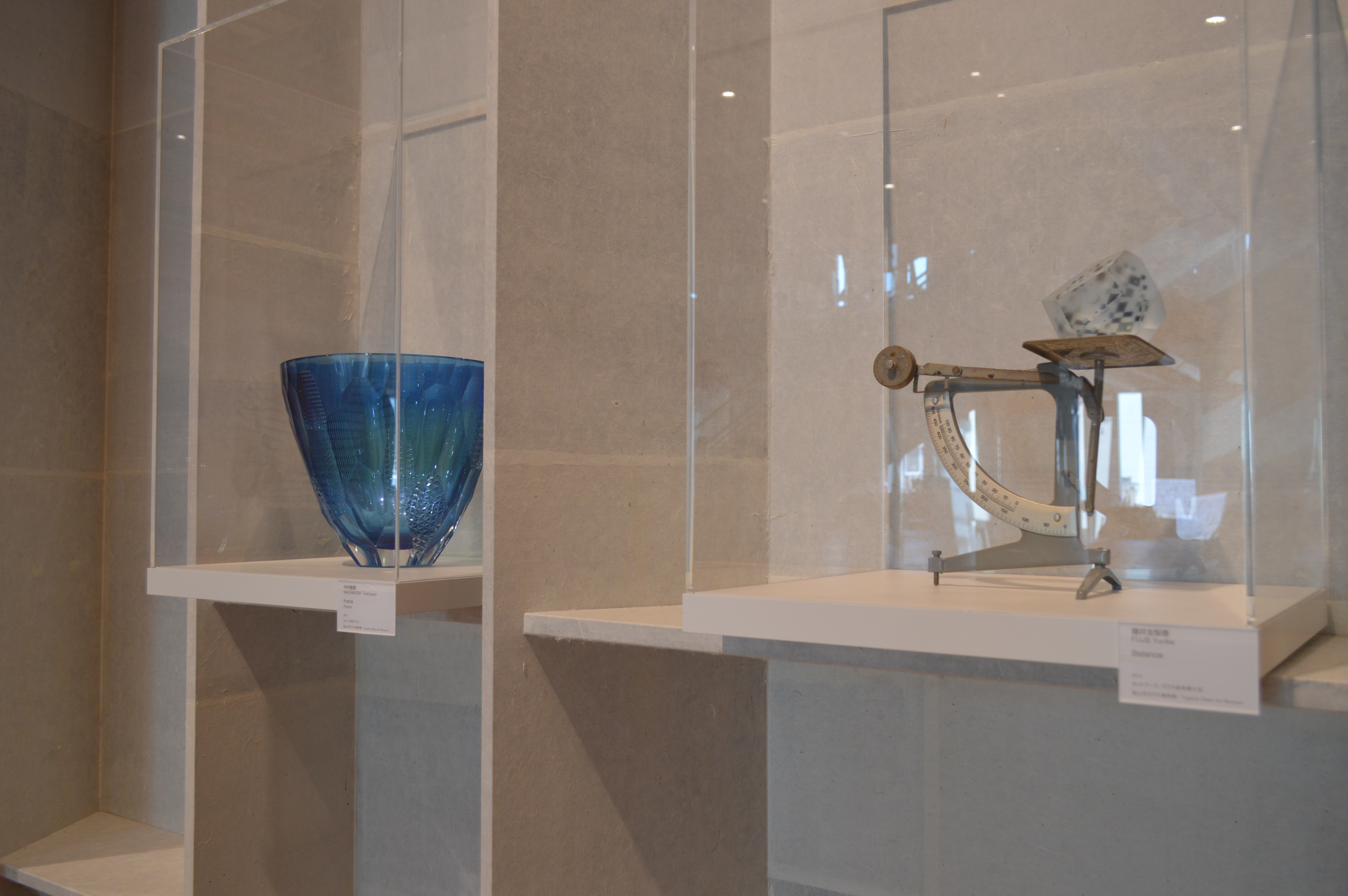 TOYAMAキラリの富山市ガラス美術館展示室前にあるグラス・アート・パサージュ（鑑賞無料）。